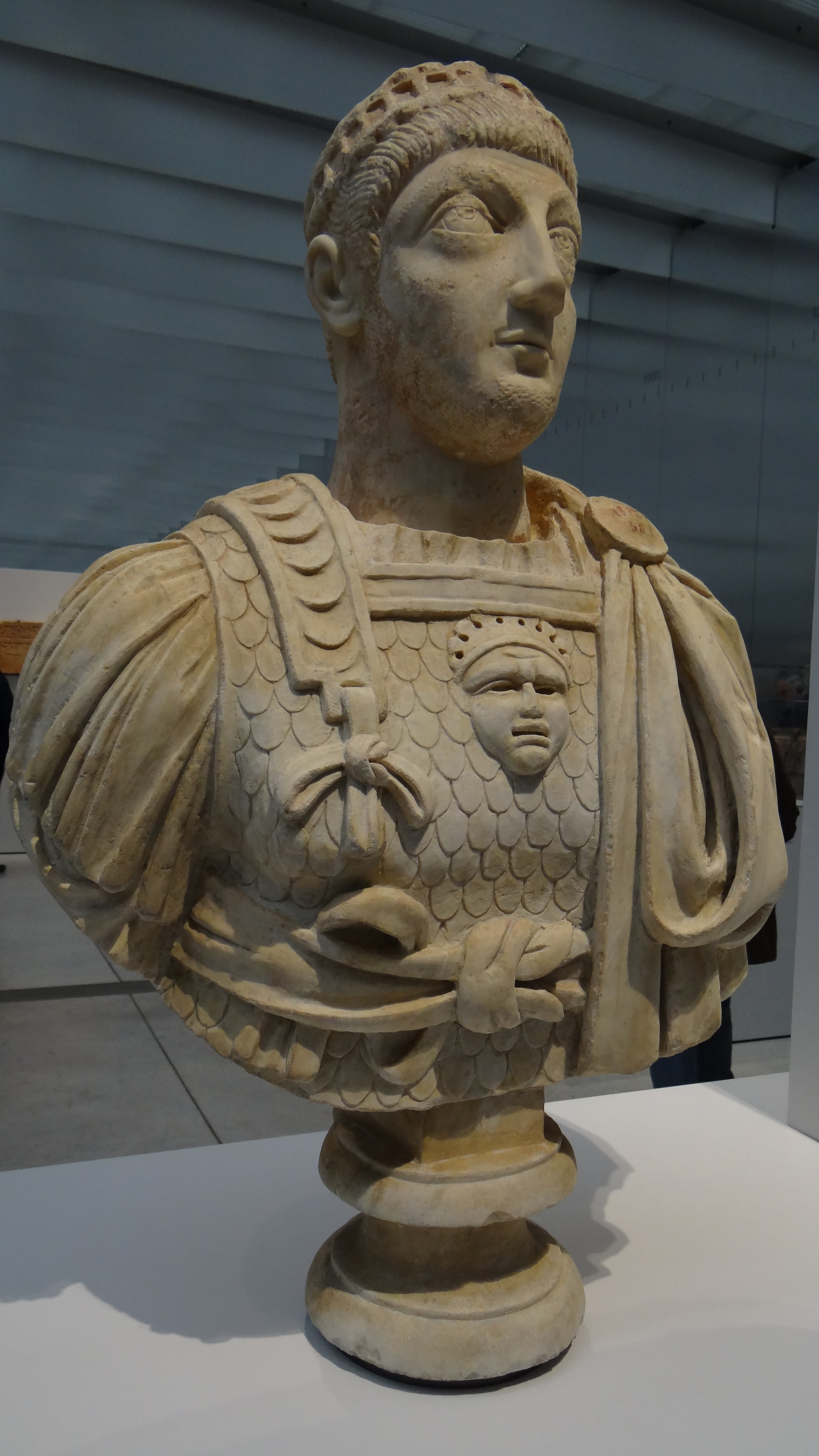 Italie vers 440 - Prince de la famille de l'empereur d'orient Théodose II (408-450)